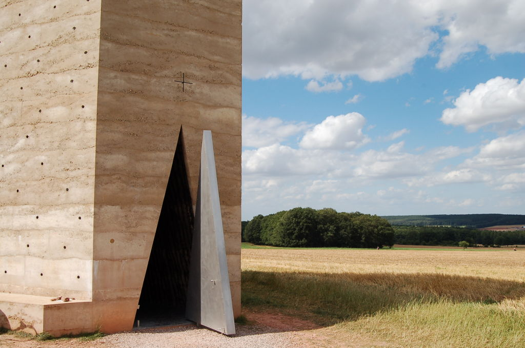 Eingang zur Feldkapelle in Wachendorf/Eifel